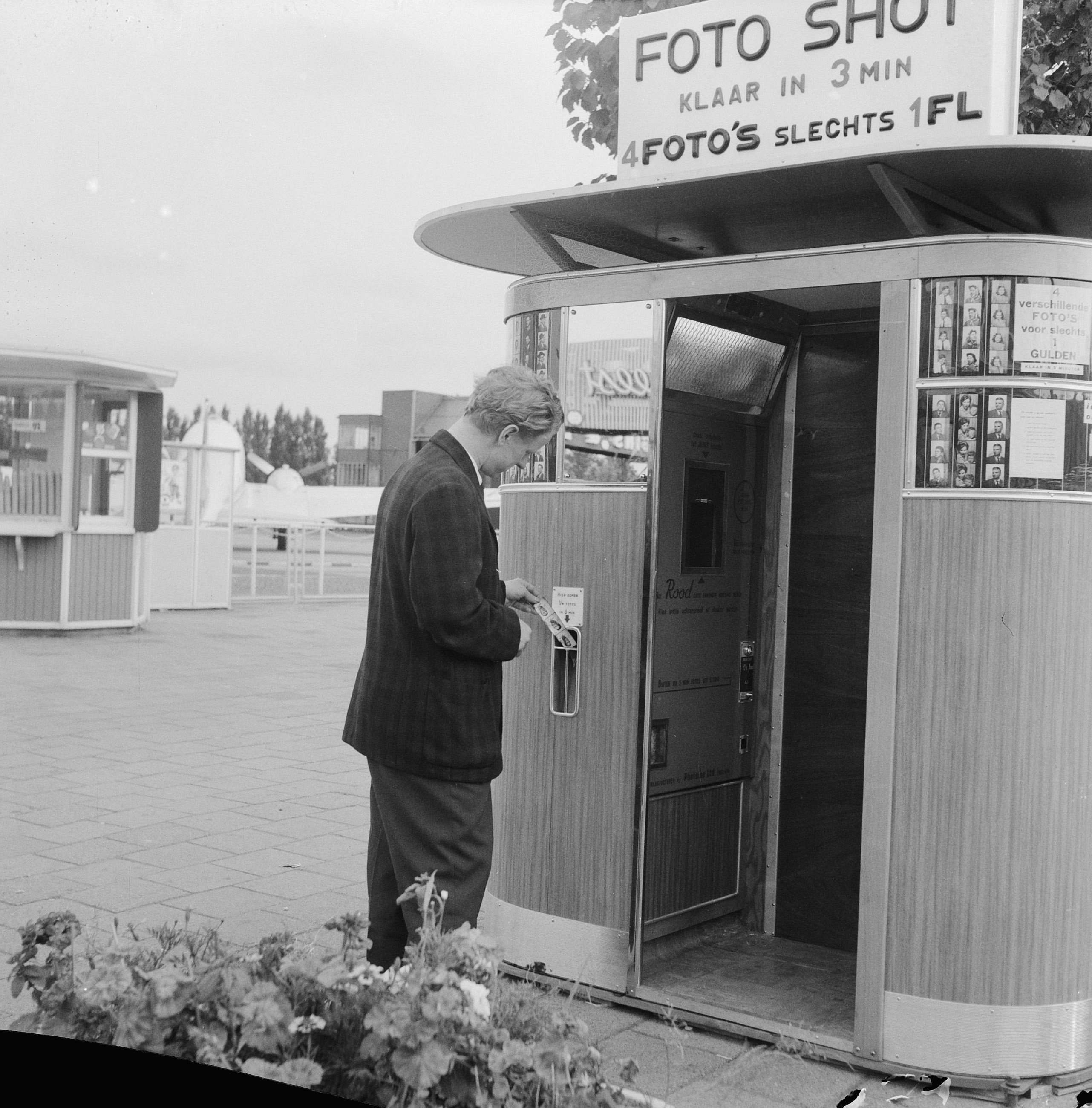 Collectie / Archief : Fotocollectie Anefo Reportage / Serie : [ onbekend ] Beschrijving : Pasfoto-automaat op Schiphol Datum : 4 juli 1961 Locatie : Noord-Holland, Schiphol Fotograaf : Nijs, Jac. de / Anefo Auteursrechthebbende : Nationaal Archief Materiaalsoort : Negatief (zwart/wit) Nummer archiefinventaris : bekijk toegang 2.24.01.03 Bestanddeelnummer : 912-6952